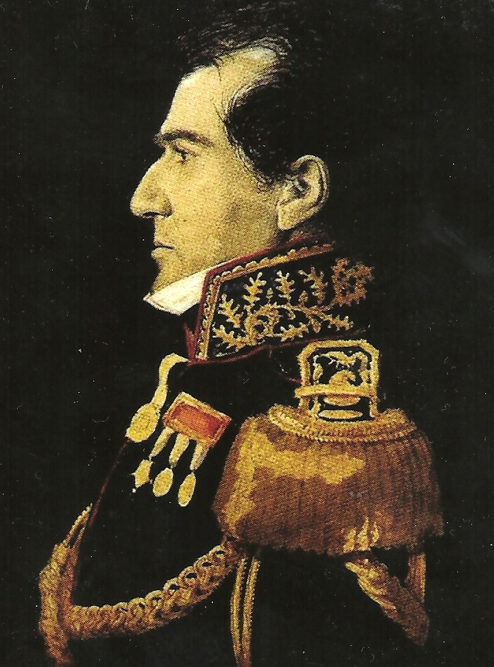 Lucio Mansilla